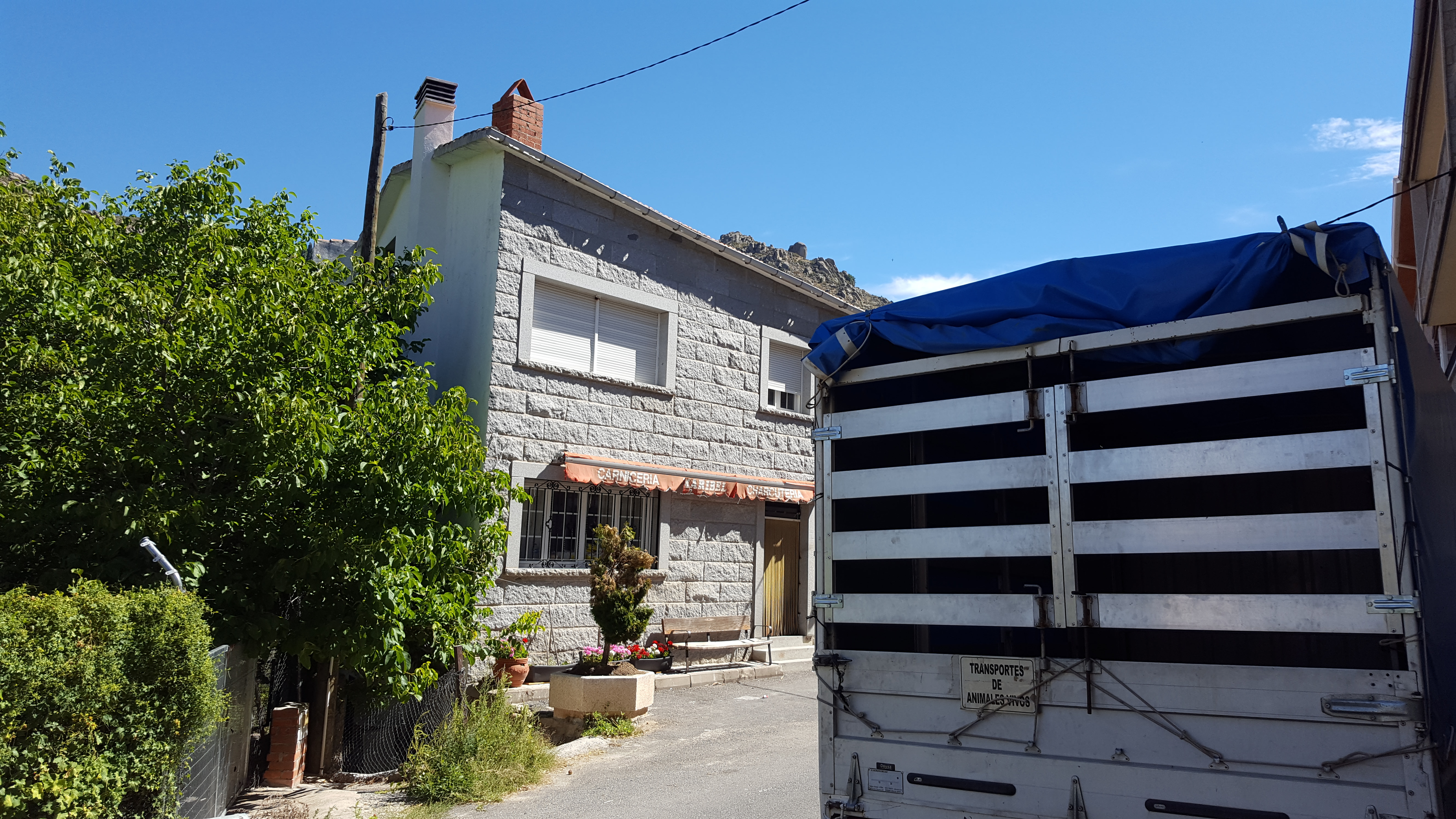 Carnicería en Navalacruz, AV, España